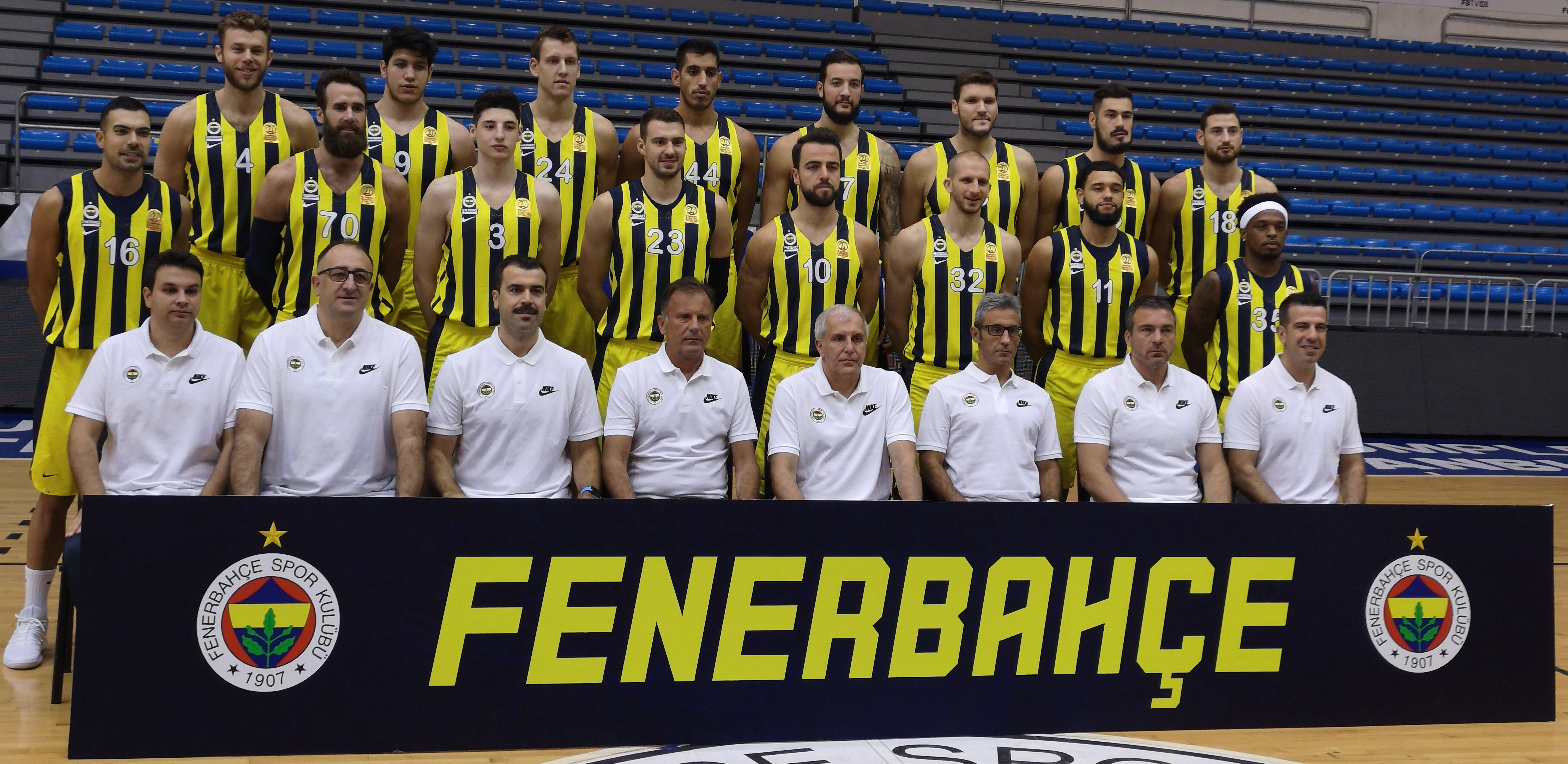 Fenerbahçe Basketball 2018-19 Team Roster Media Day 20180925